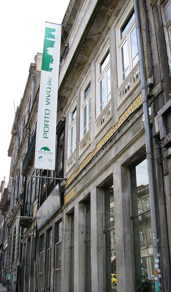 "Porto Vivo SRU" in R. Mouzinho da Silveira, 212, Porto, Portugal